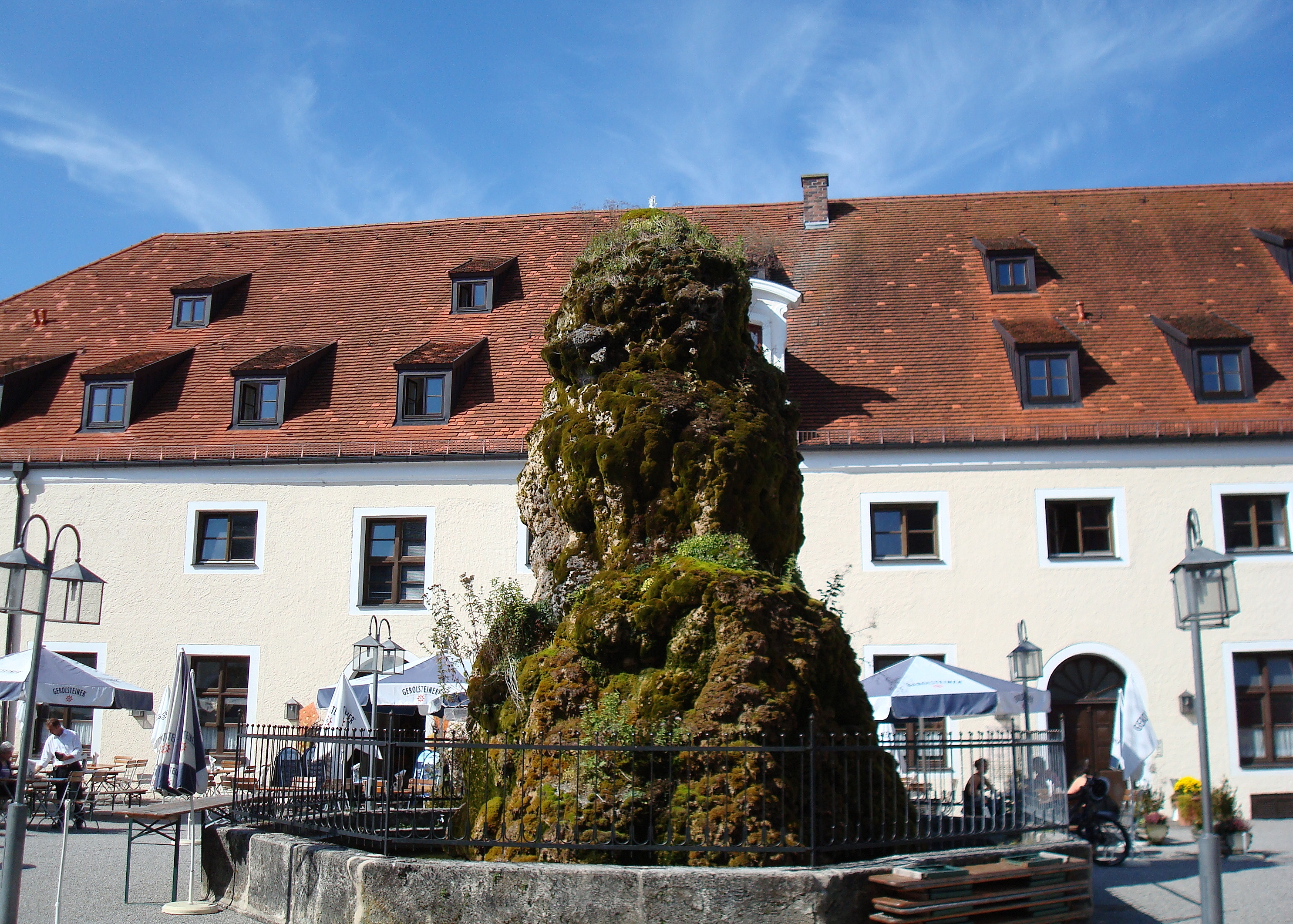 Seefeld, Schlosshof. Teilansicht des inneren Wirtschaftshofes mit TuffsteinbrunnenThis is a photograph of an architectural monument.